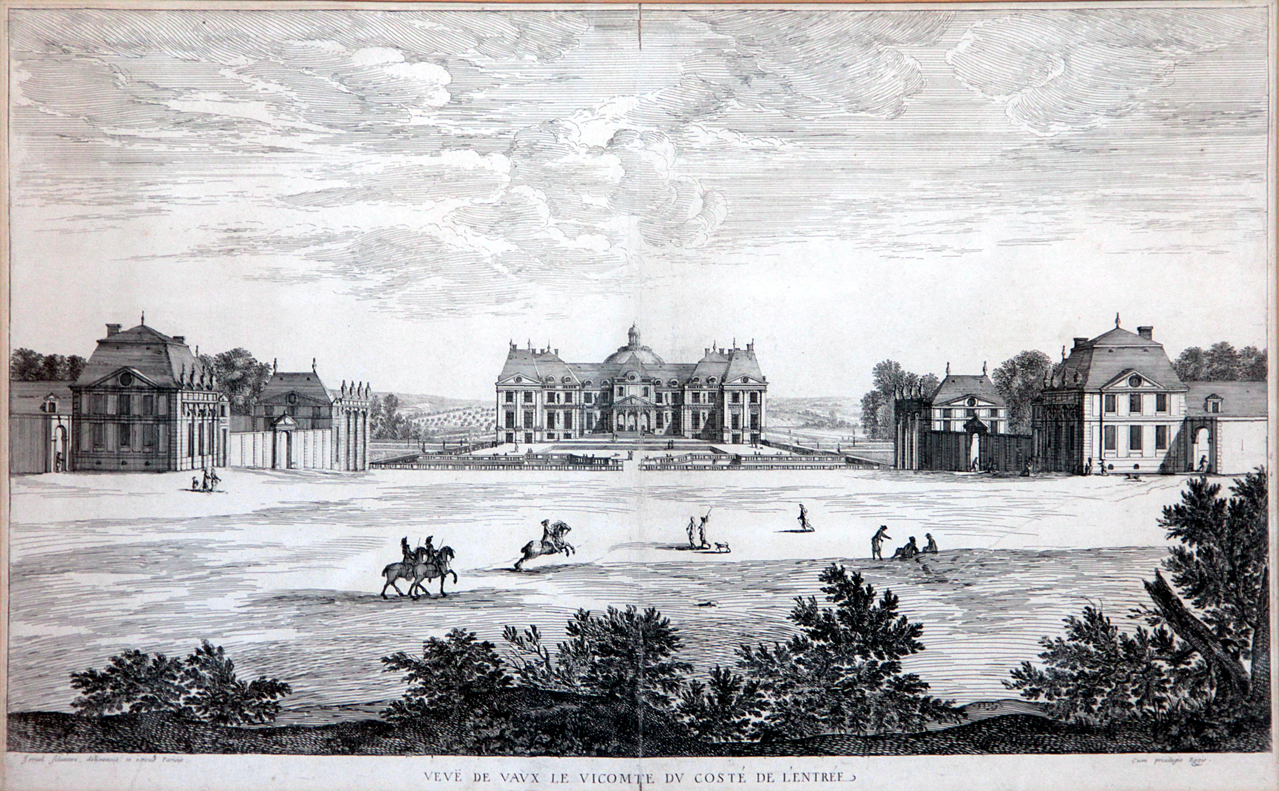 Gravure « VEVË DE VAUX LE VICOMTE DV COSTÉ DE L’ENTRÉE » réalisée dans la seconde moitié du XVIIIe siècle par Israël Silvestre pour Nicolas Fouquet propriétaire du château de Vaux-le-Vicomte - Maincy (Seine-et-Marne, France).